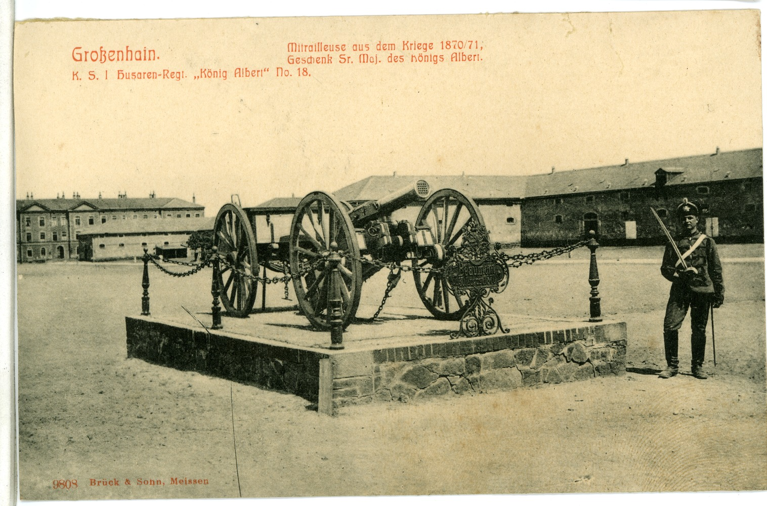 Großenhain; Mitrailleuse aus dem Kriege 1870/71, Husaren-Regiment Nr. 18 This postcard is from publisher Brück & Sohn in Meißen ( postcard has a unique number 09808 and is available in a higher resolution at the publisher. This images was uploaded in a cooperation project between Wikipedians and the publisher.